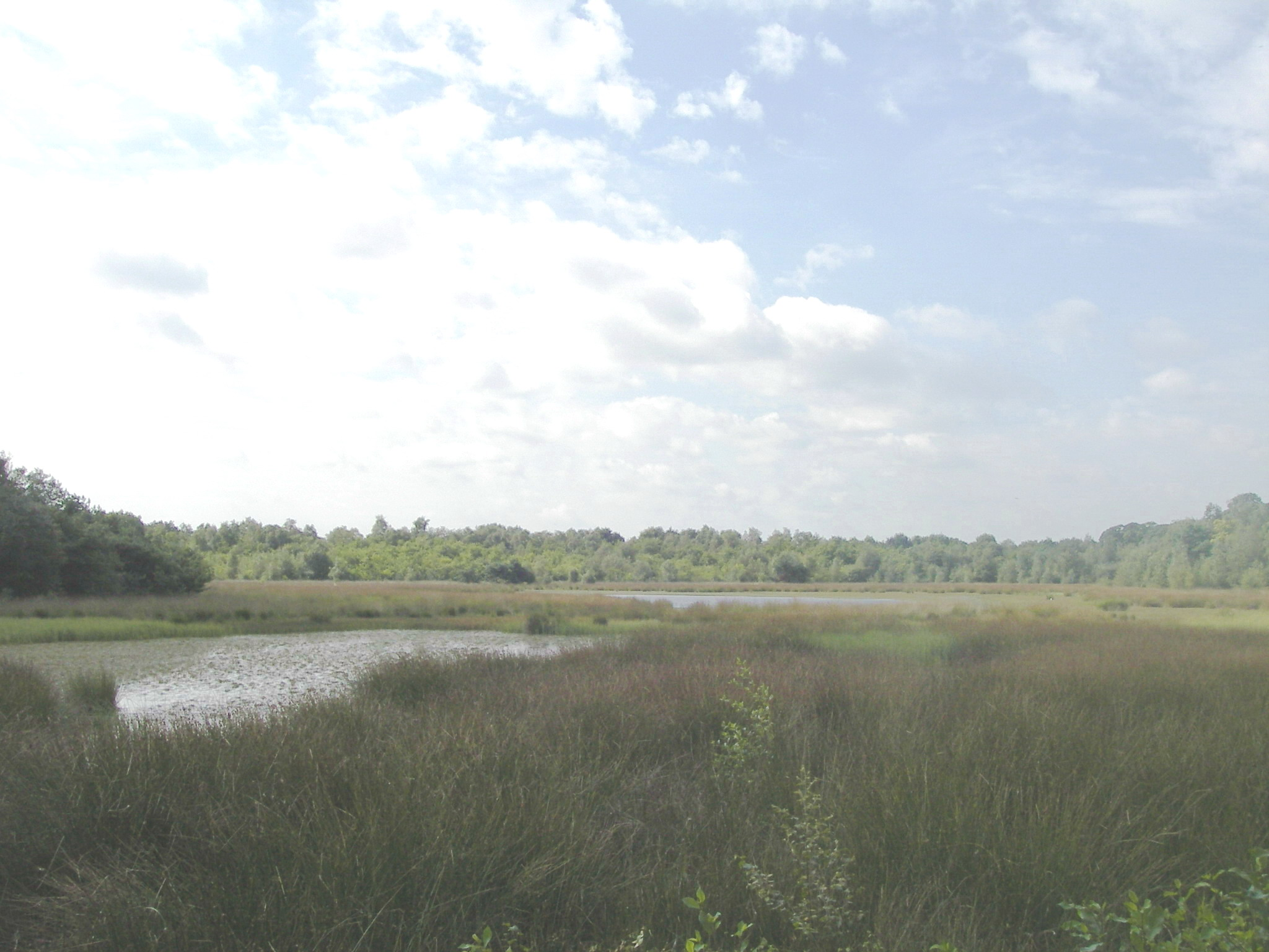 Overzicht van de Rouwkuilen, een sterk verzuurd ven in de gemeente Venray.